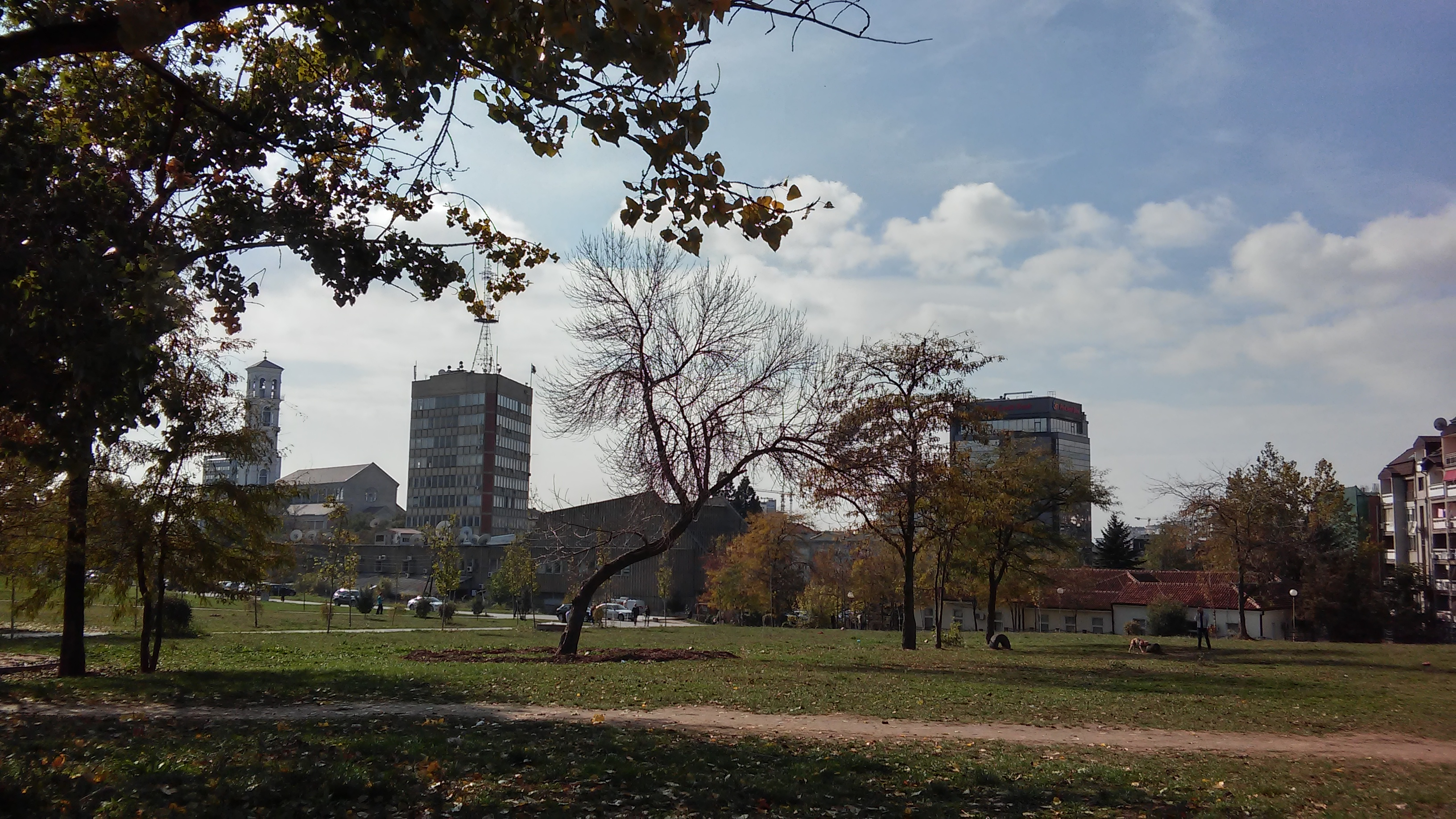 Ndodhet në Prishtinë, Kosovë